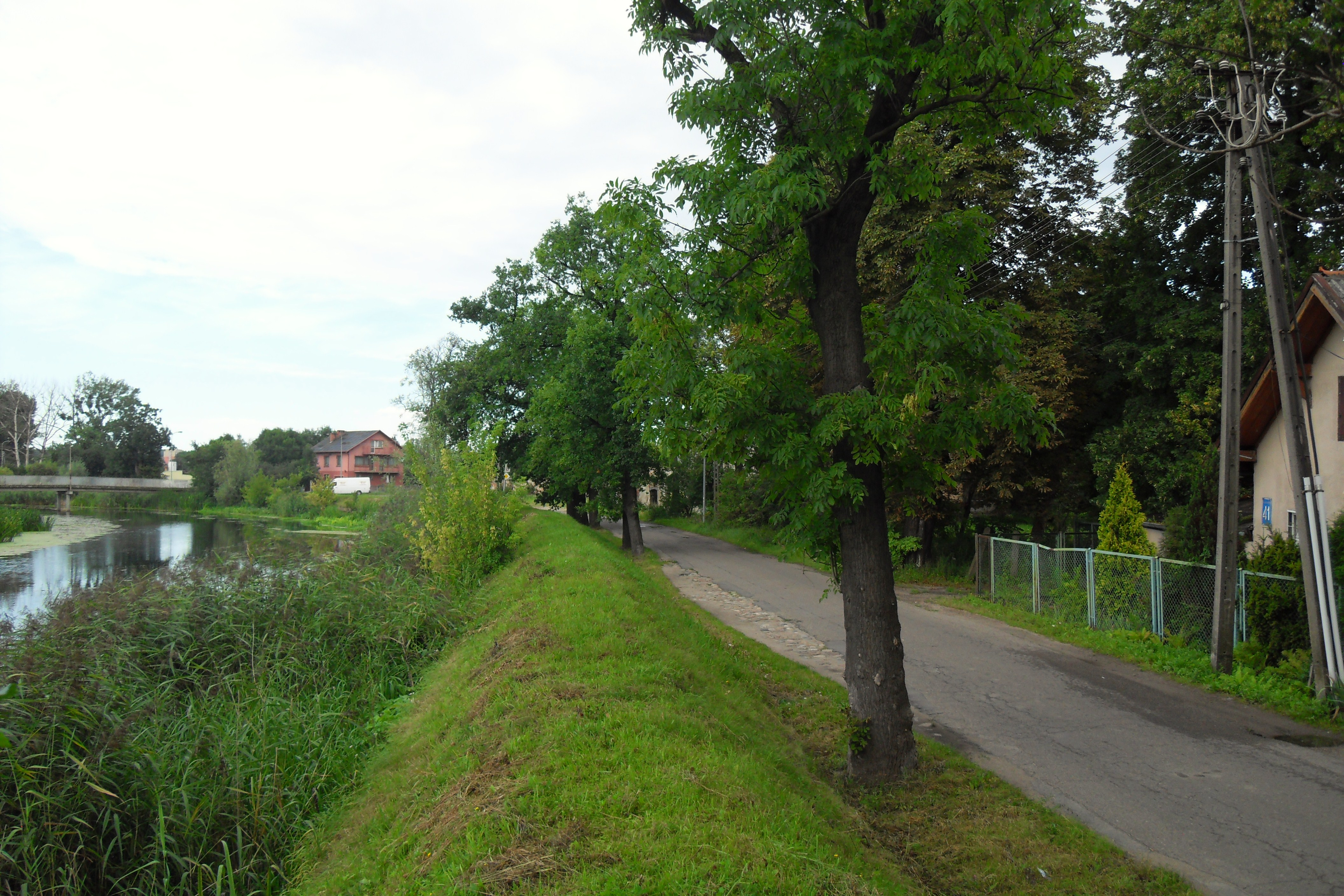 Gdańsk Olszynka Mała, ul. Olszyńska i Motława.